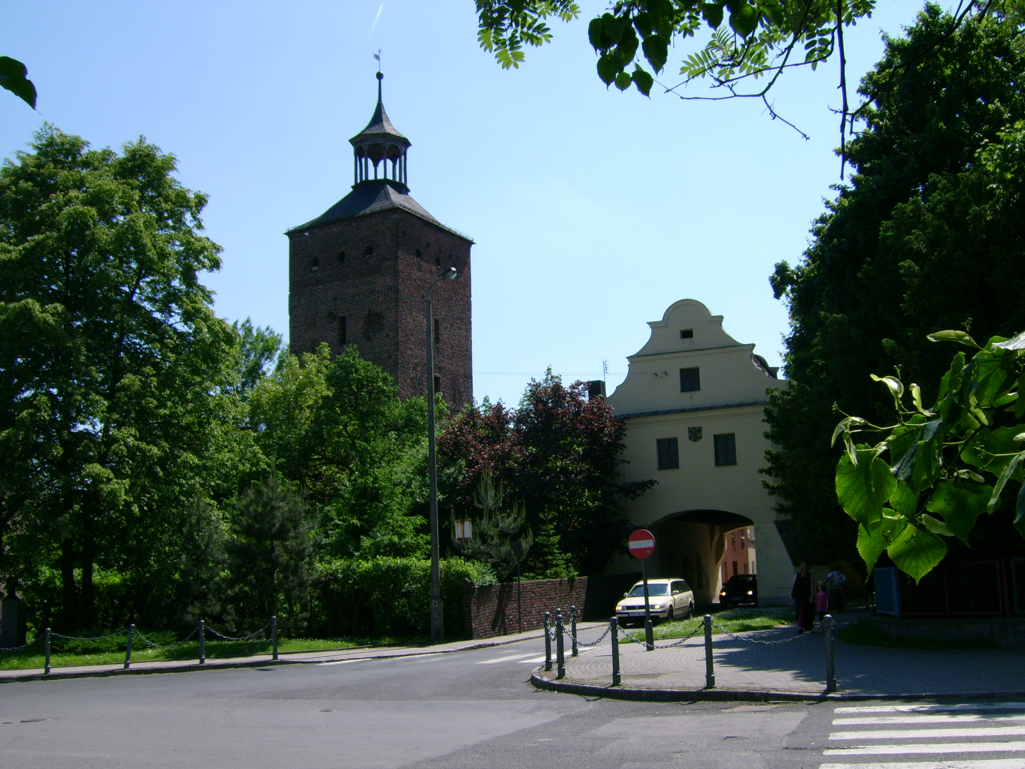 Brama miejska, a w głębi Baszta strażniczo-więzienna.